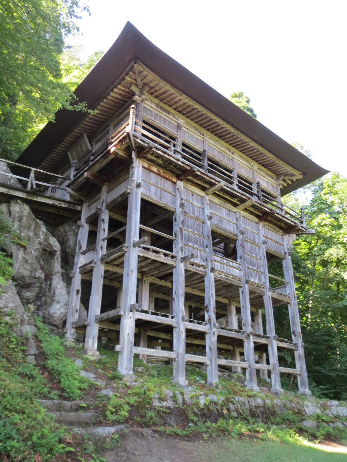 会津美里町にある左下り観音